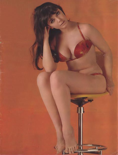 La vedette argentina Zulma Faiad en la portada de la revista Siete Días Ilustrados.